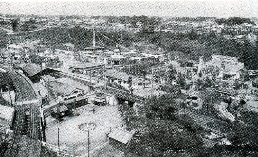 多摩川園（たまがわえん、Tamagawa-en）は、かつて東京都大田区田園調布にあった遊園地である